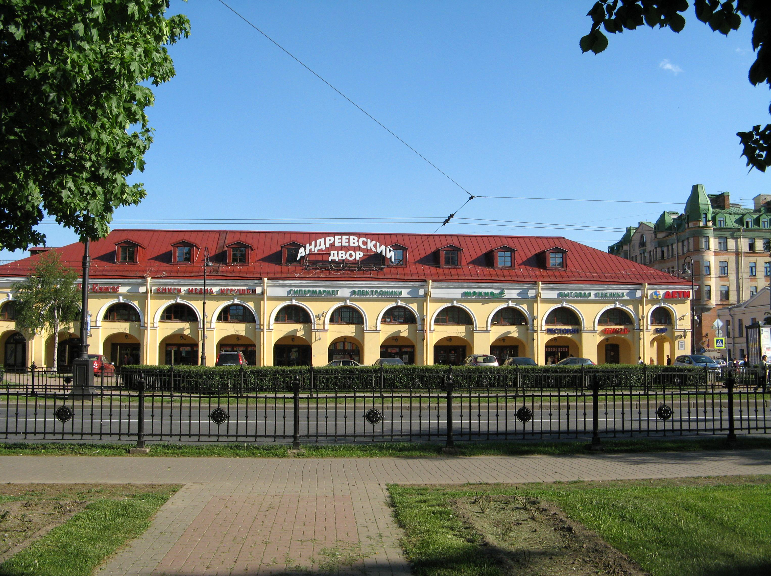 Рынок Андреевский (Санкт-Петербург и Лен.область, Санкт-Петербург, Большой проспект Васильевского острова, 18)